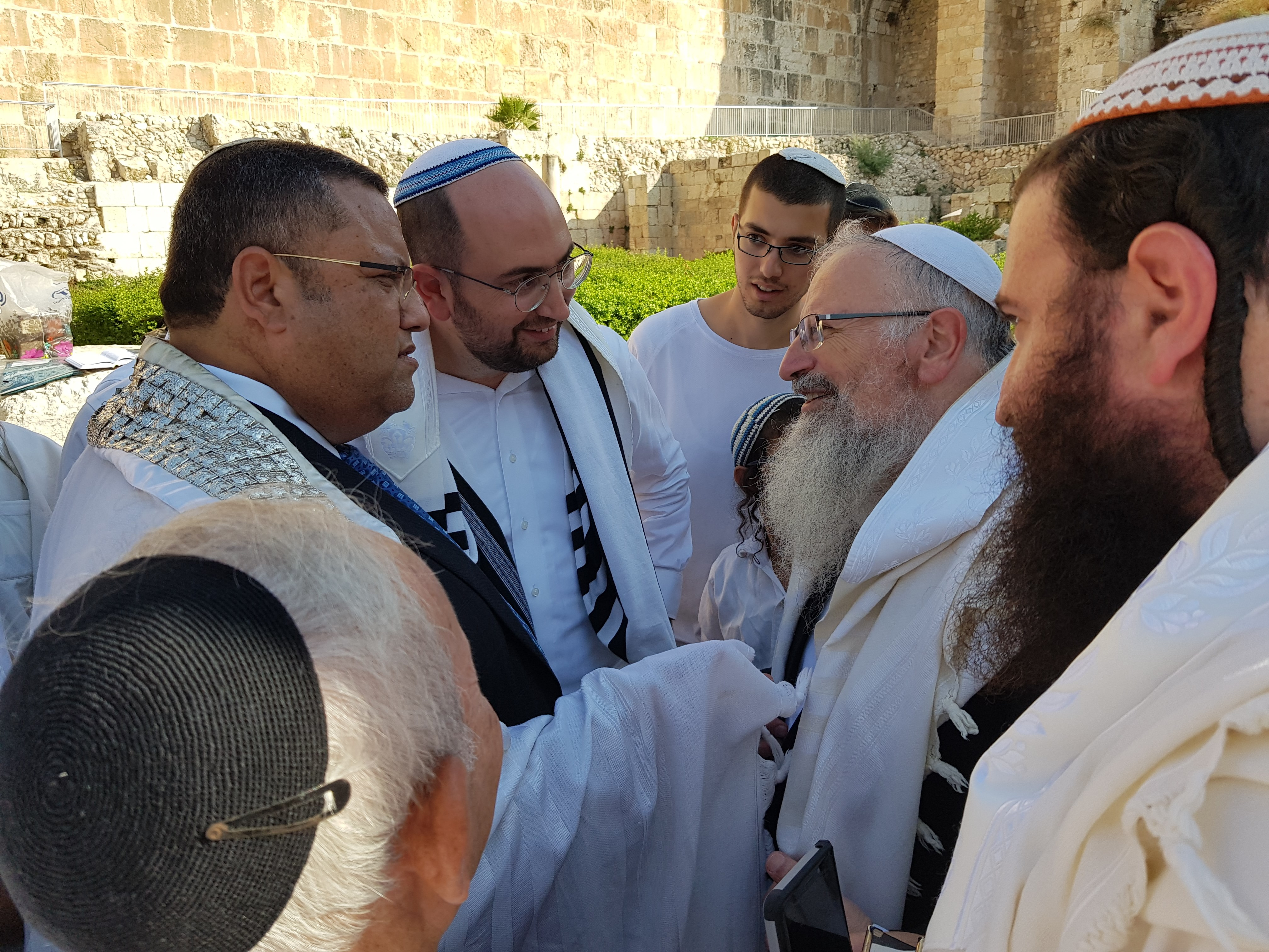 הרב שמואל וראש עיריית ירושלים, משה ליאון, בהלל בכותל הדרומי, סוכות התשע"ט